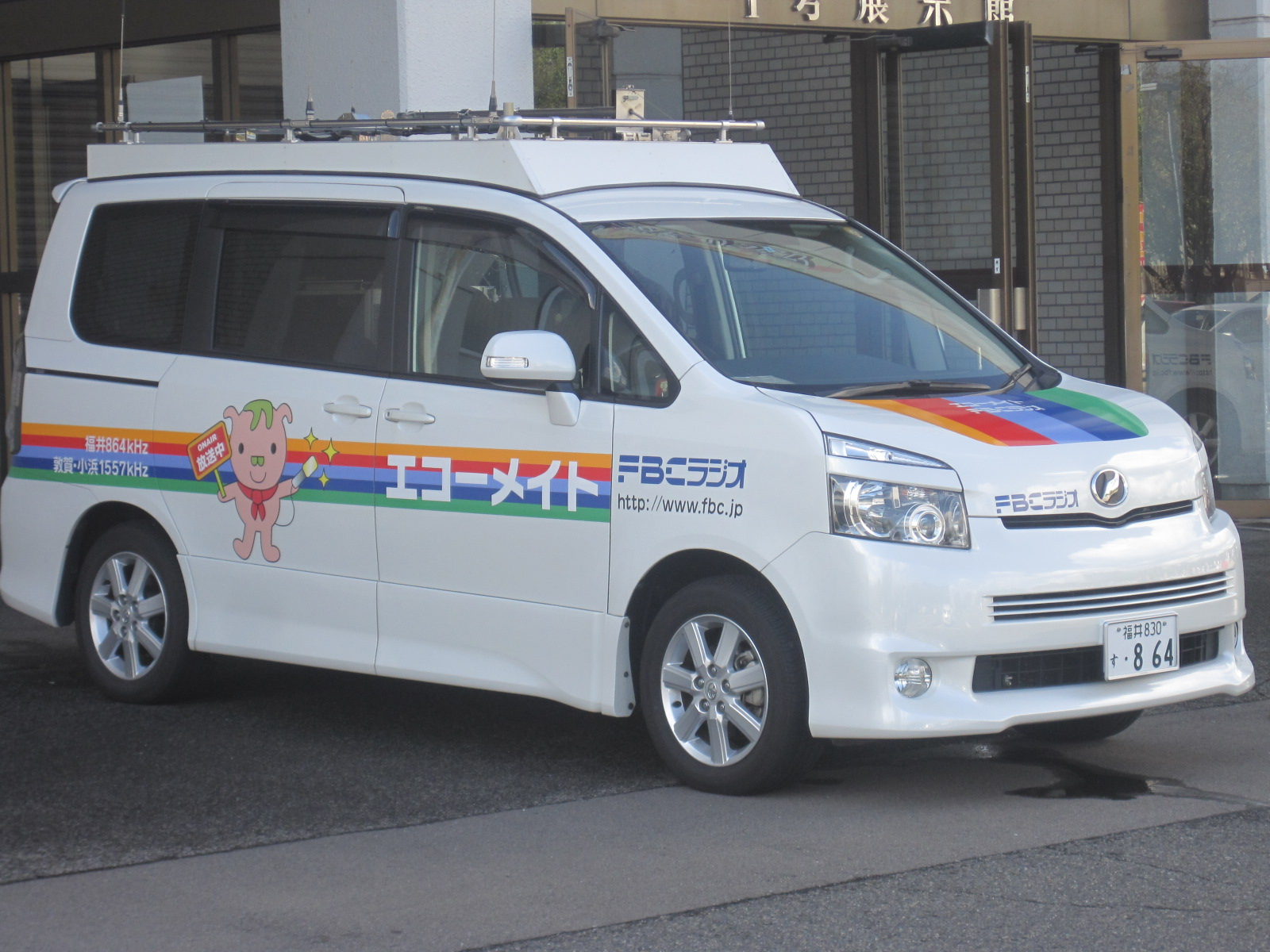 福井放送のラジオカー「エコーメイト」。トヨタ自動車のヴォクシーを使用している。